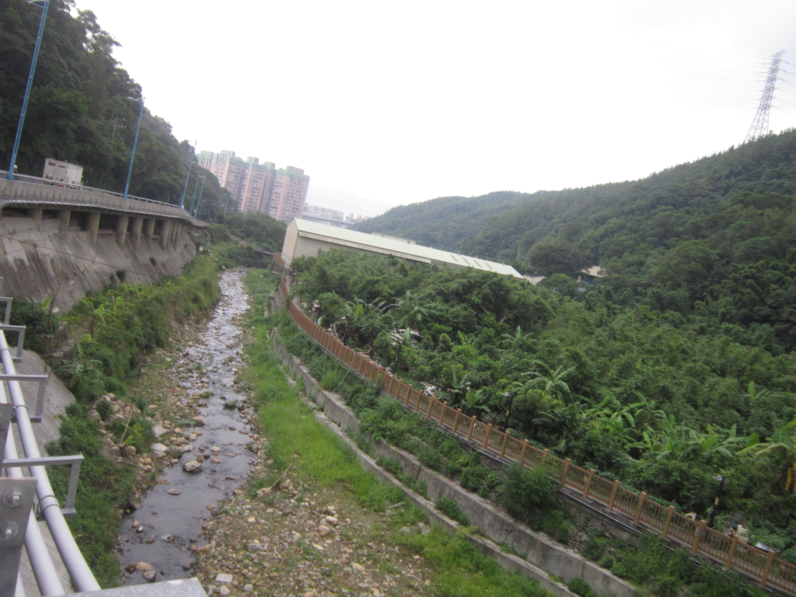 北118號道(壽山路)緊貼一旁的十八坑溪